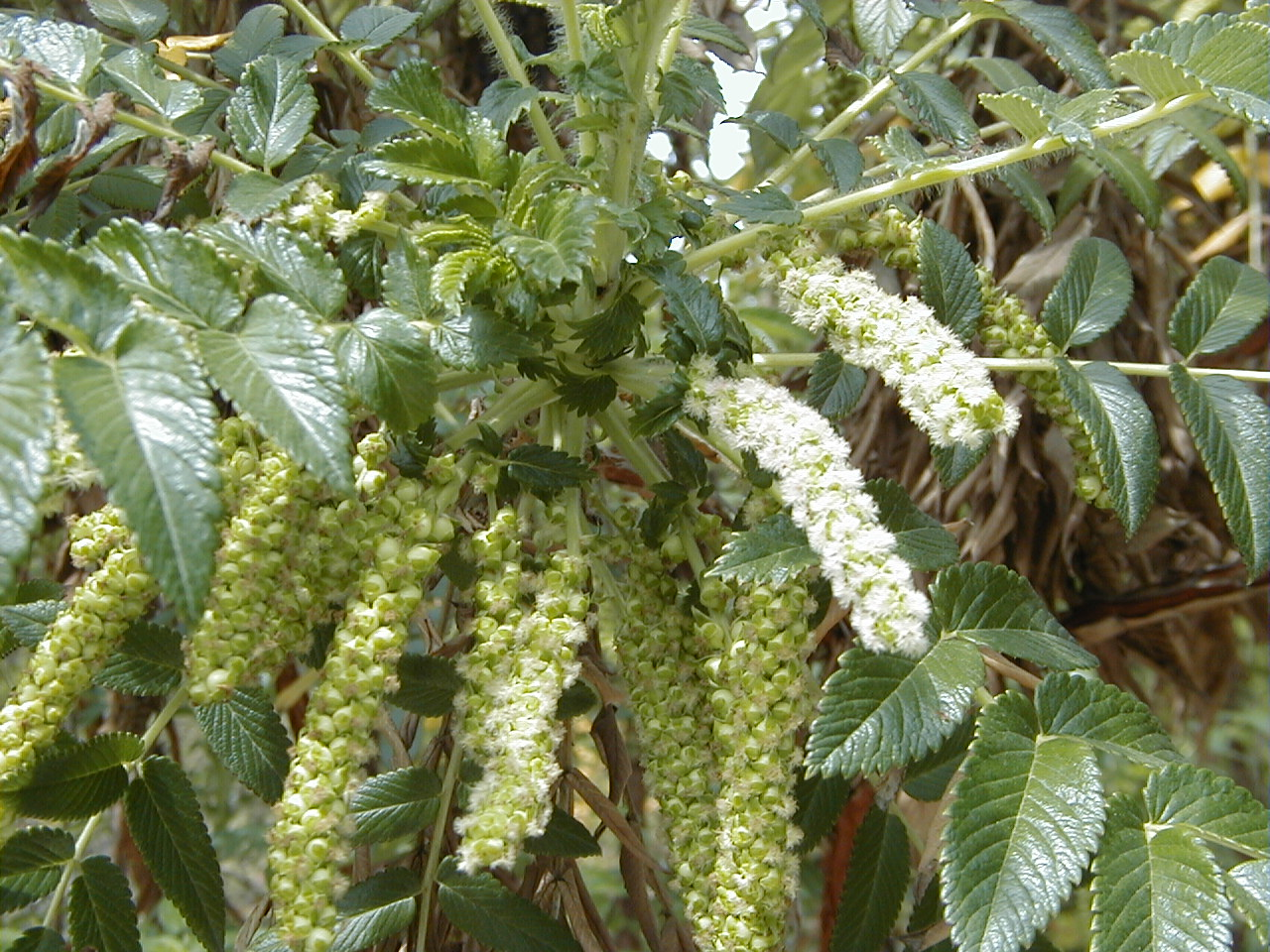 Bencomia caudata. Location: Real Jardín Botánico, Madrid.